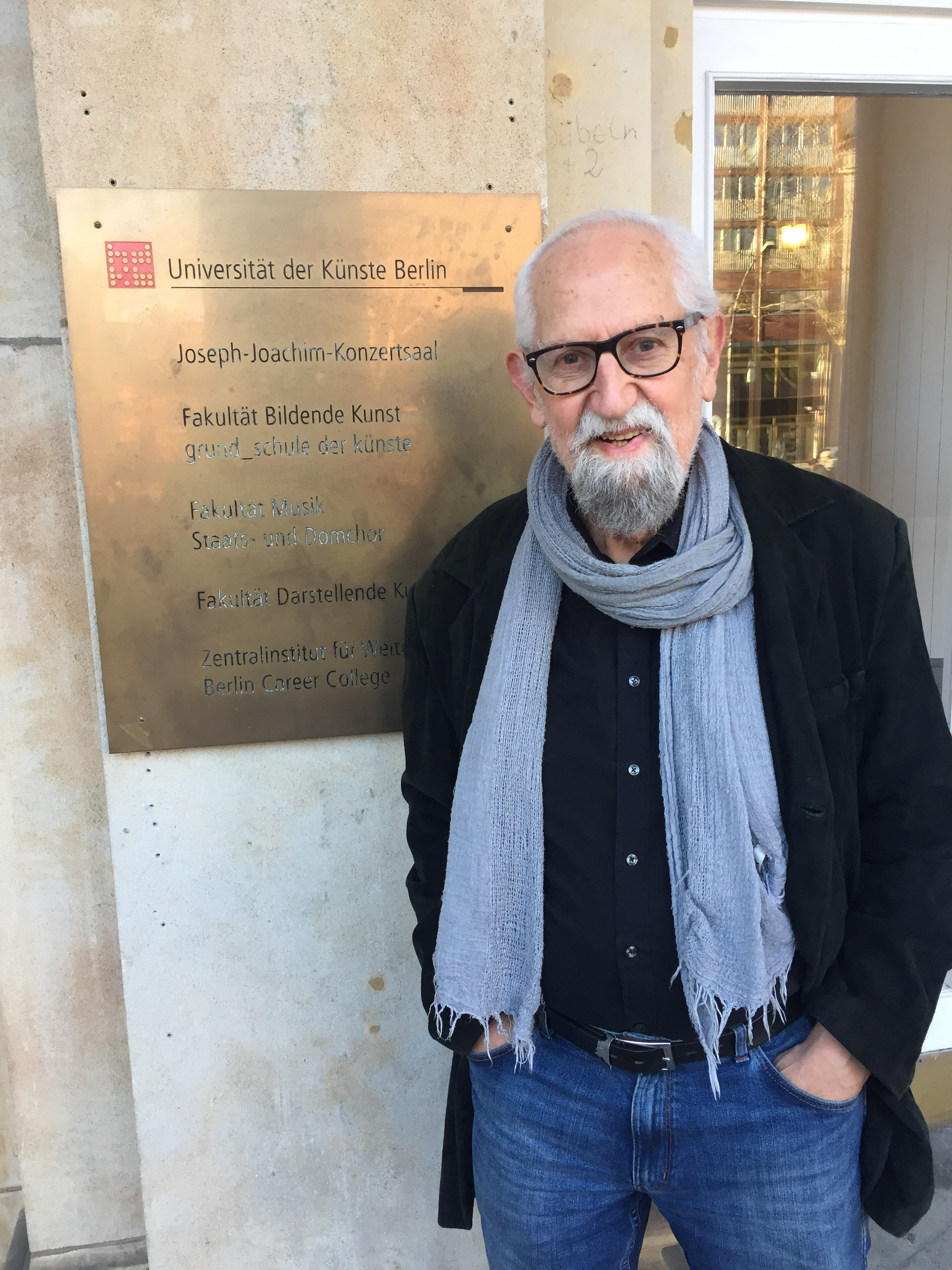 Nickel vor UdK